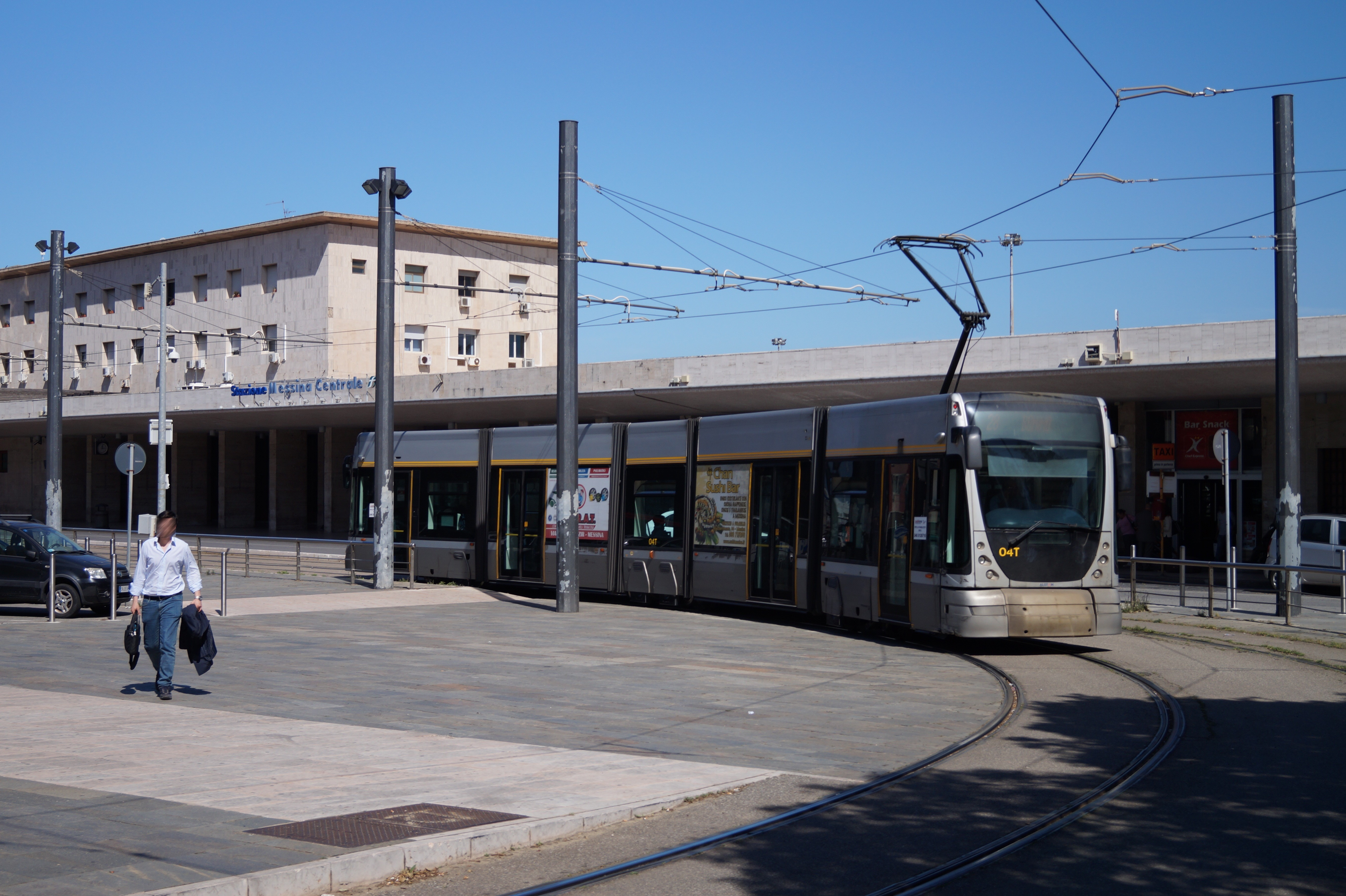 Bahnhof Messina Centrale mit Straßenbahn Messina